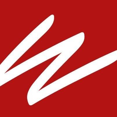 Logo 2018